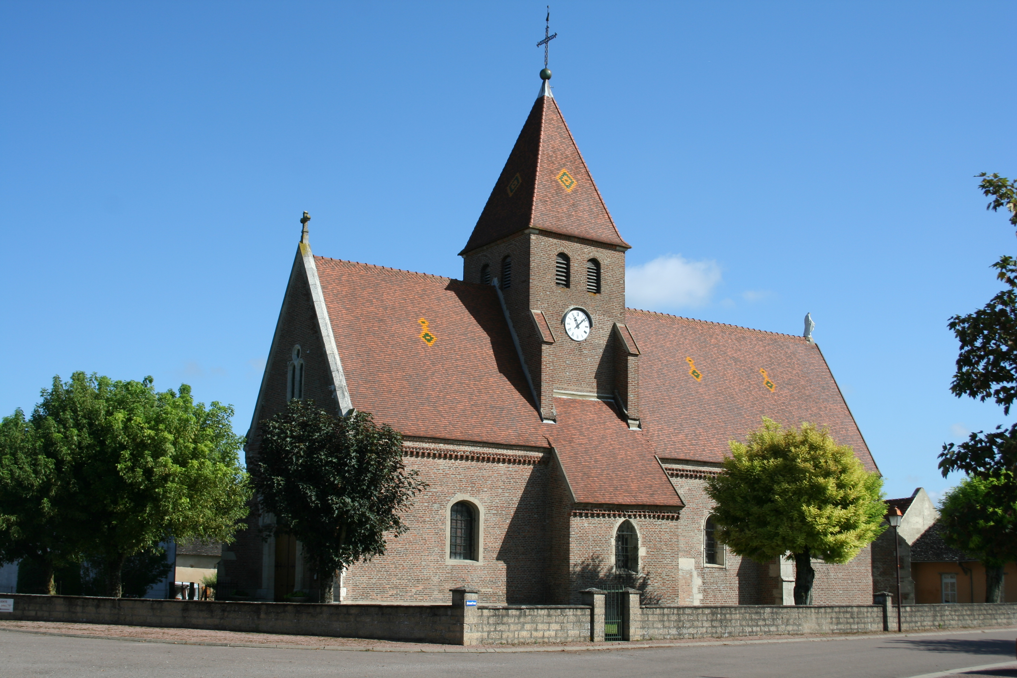 Fretterans - Eglise